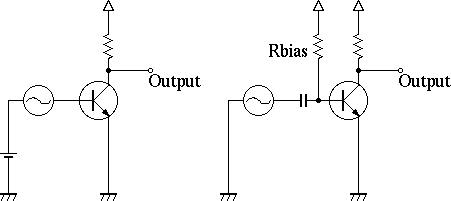 Fixed-bias circuit